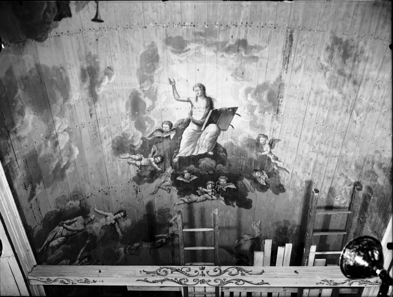 Öckerö gamla kyrka. Takmålning, östra delen, av Jean Liljedahl